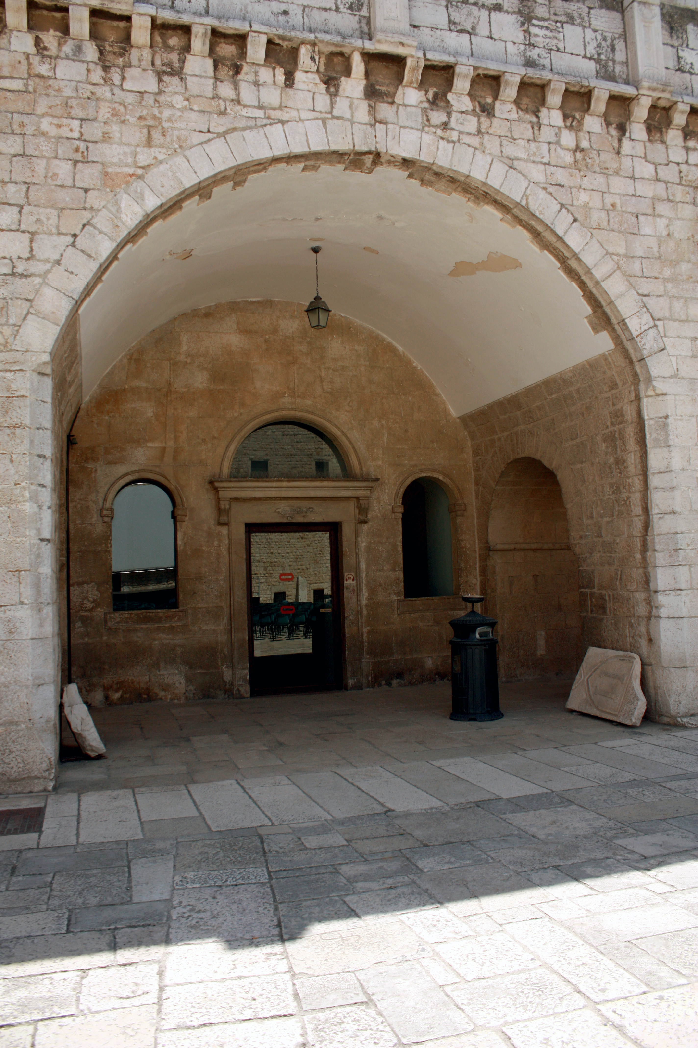 Castello di Barletta - L'ingresso alla cappella sul fronte sud, in cui è conservato il presunto busto di Federico II.